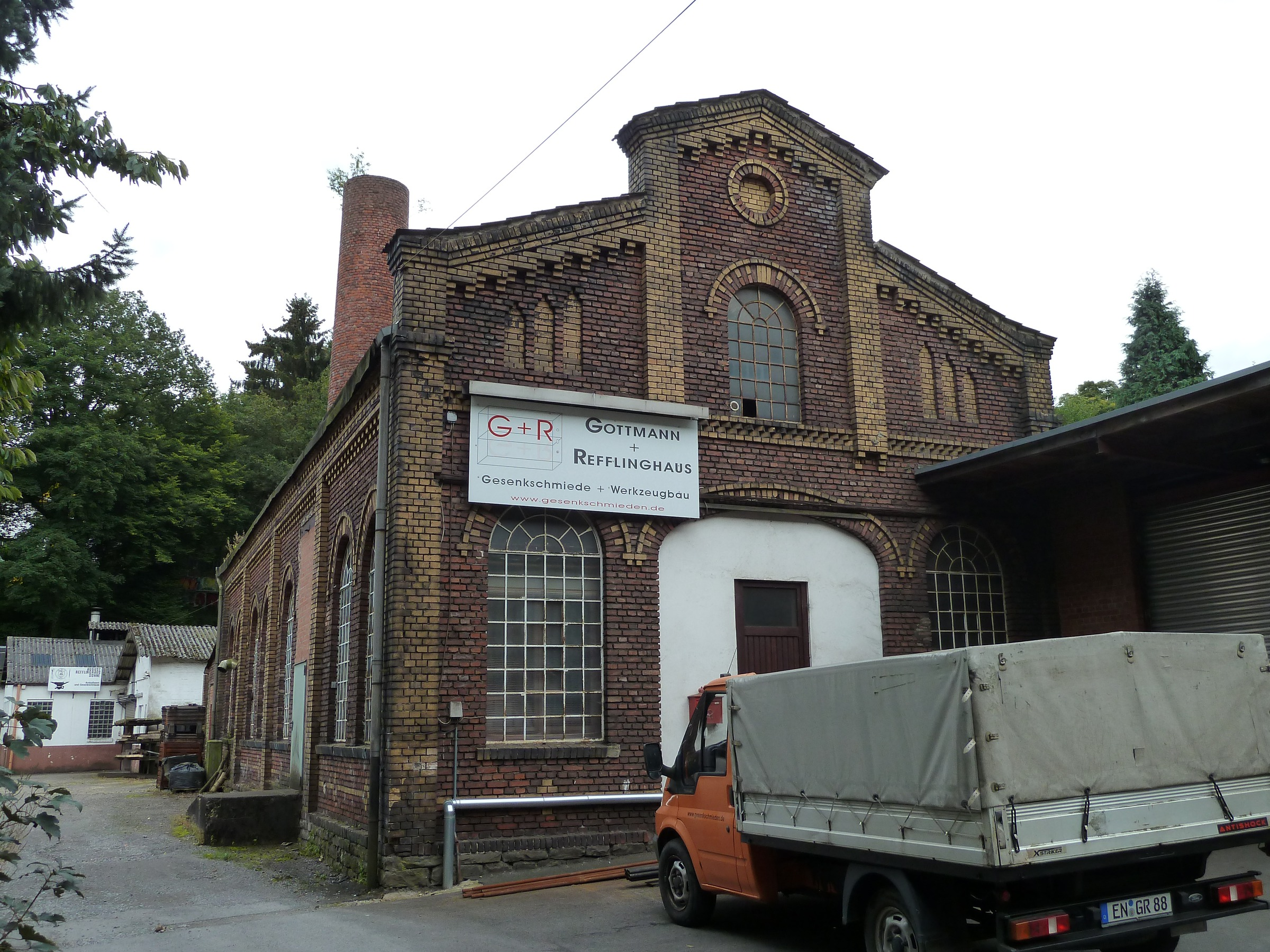 Maschinenhaus der Firma Brackelsberg in EnnepetalThis is a photograph of an architectural monument., no. 0